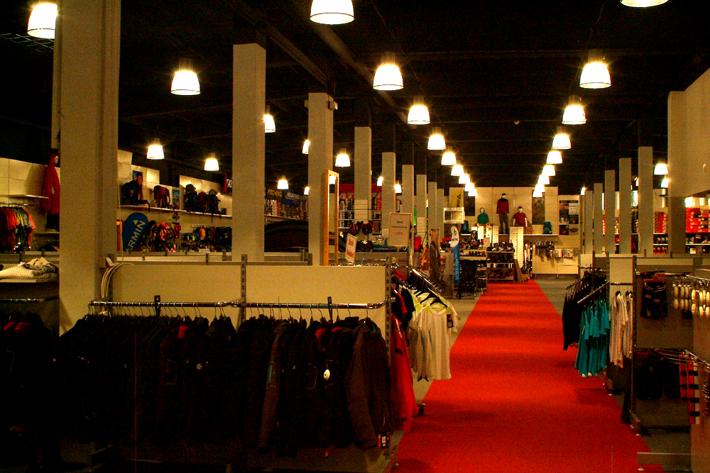 Blick in den großen Verkaufsraum von Sport Kaufmann in Hannover, Weidendamm 6 ...